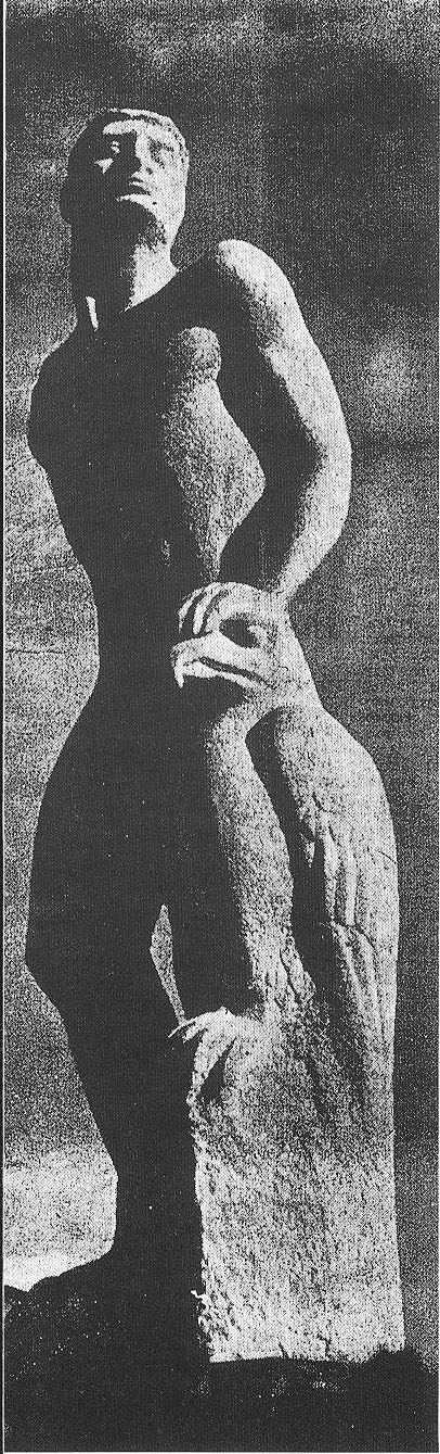 Sculpture